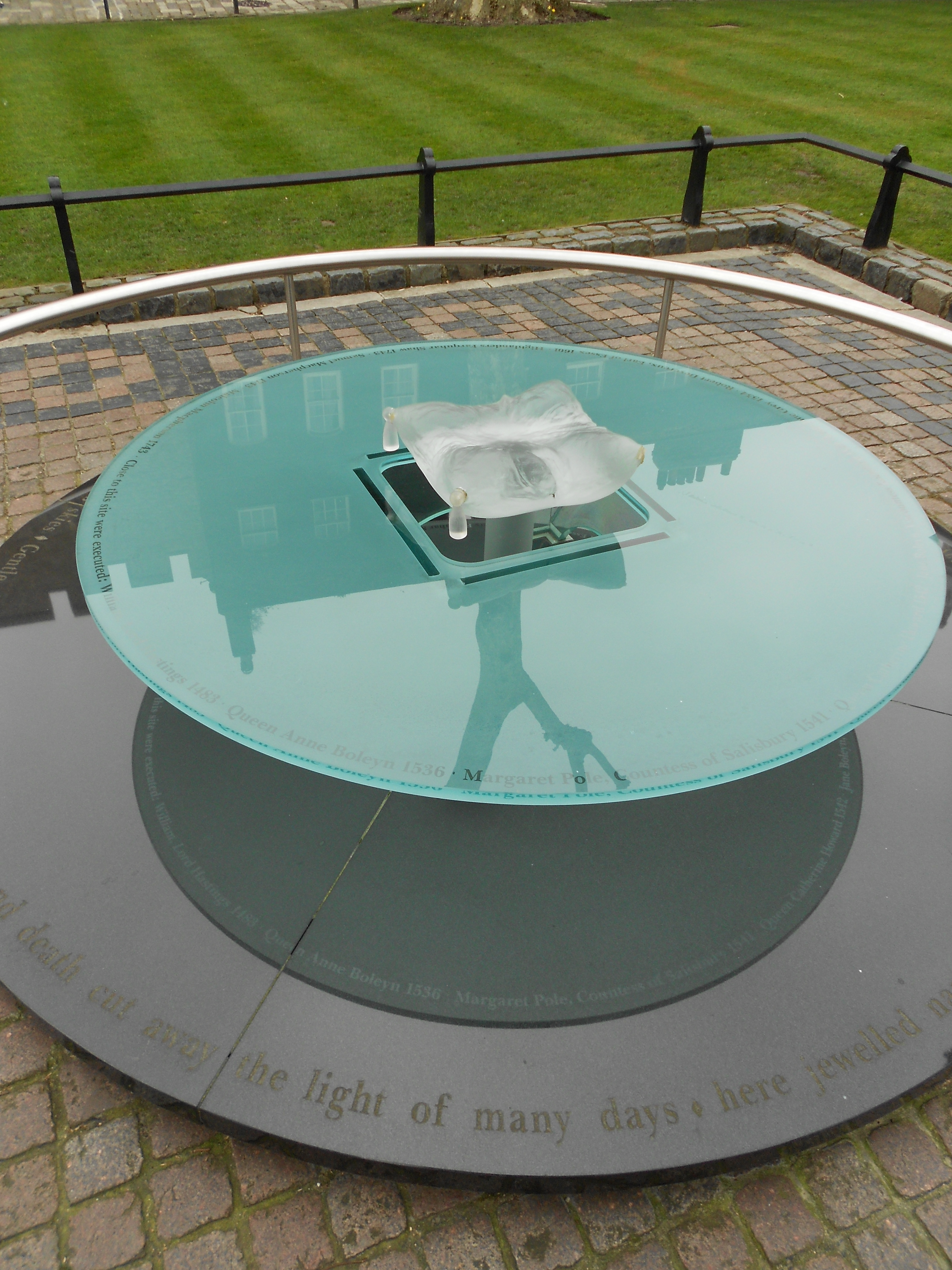 Gedenkplatte an der Hinrichtungsstätte im Tower of London